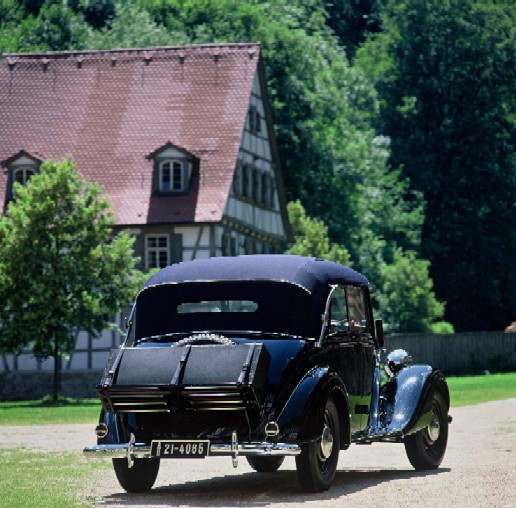 Bildbeschreibung: 170 V mit Kofferbrücke, 1937-1940 Quelle: Mediaseite der DaimlerChryslerAG Genehmigung: Gern können Sie für Ihre Tätigkeit für die Wikipedia Inhalte der DaimlerChrysler Medienseiten verwenden. Dazu erkennen wir die Bedingungen nach GNU-FDL an. Das Angebot bezieht sich auch auf die vorhandenen Bilder.(Dr.Josef Ernst, Communications, DaimlerChrysler AG)